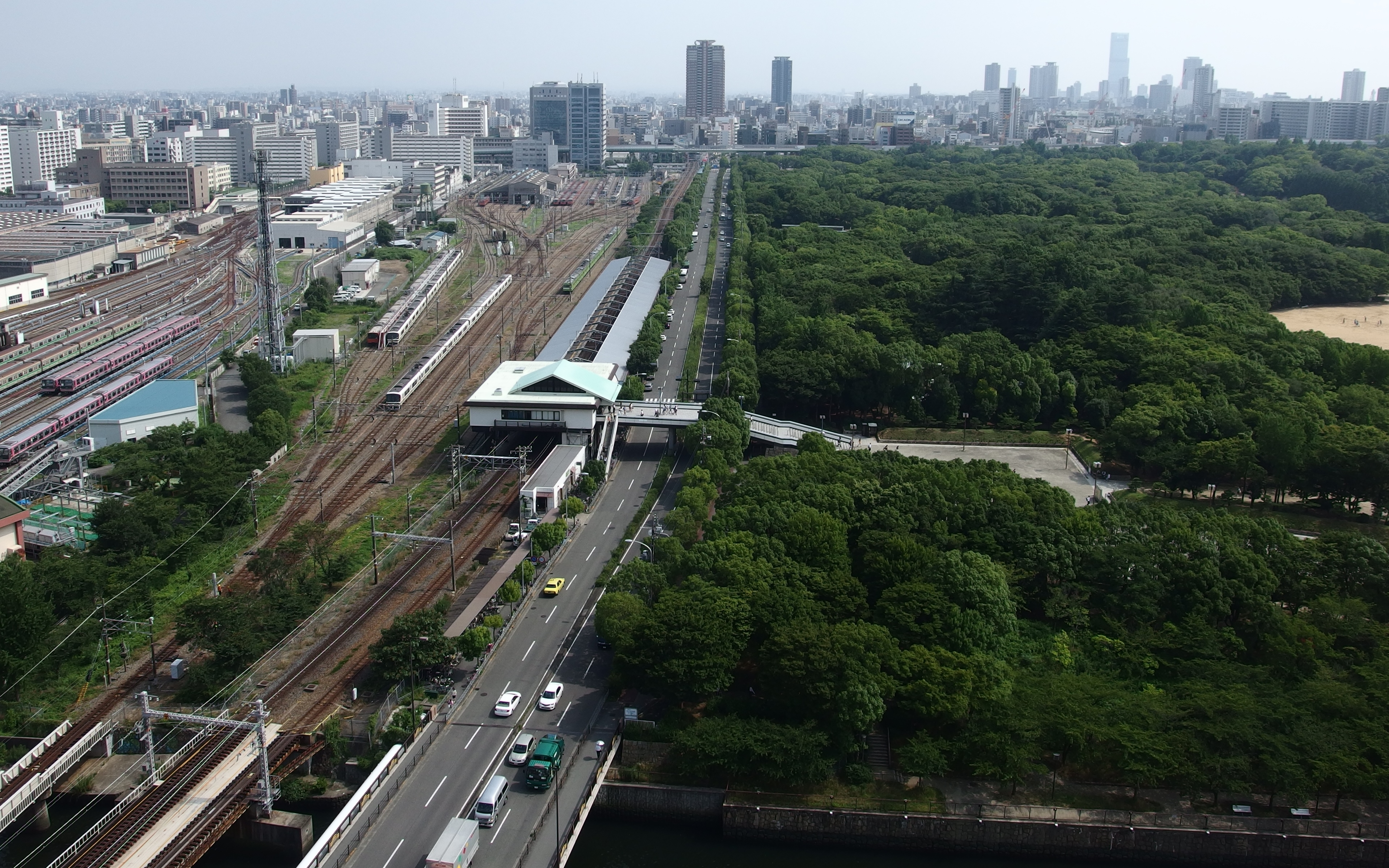 大阪ビジネスパークから望む玉造筋